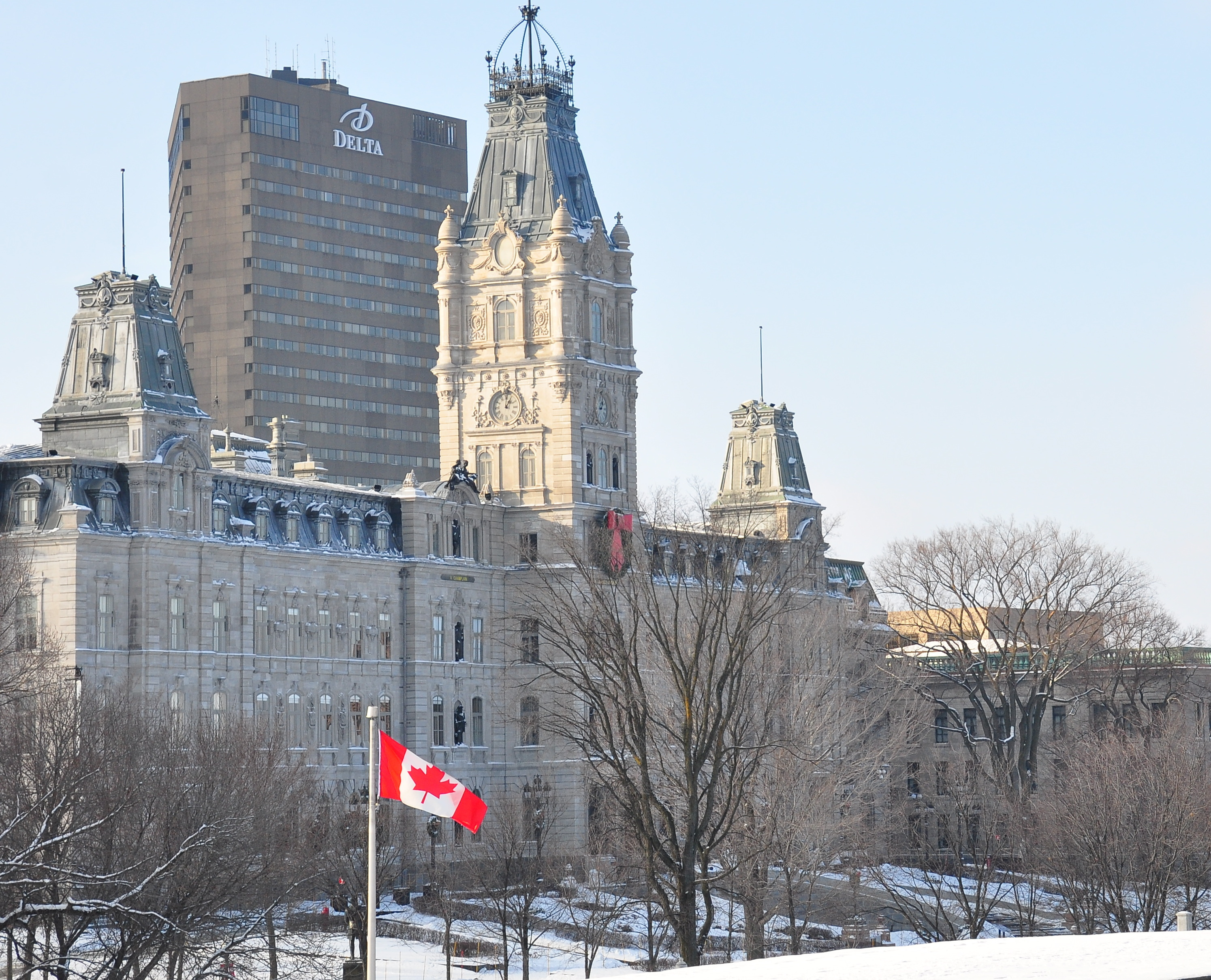 Assemblée nationale du Québec